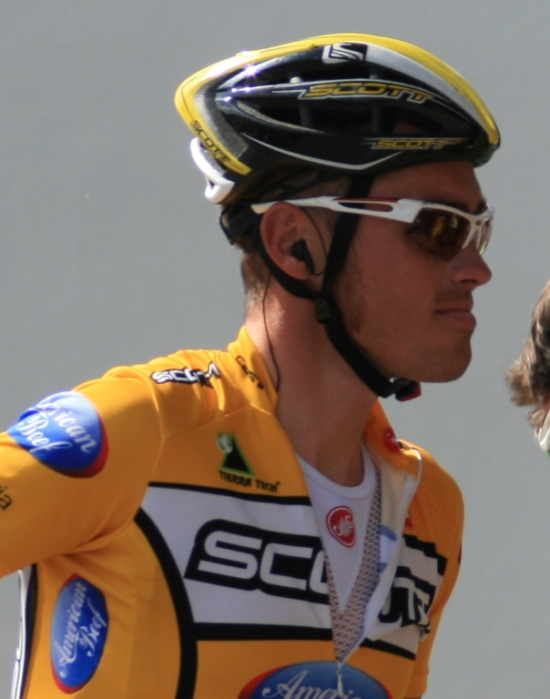 Jesus Del Nero, à l'Eneco Tour 2008, à Ardooie